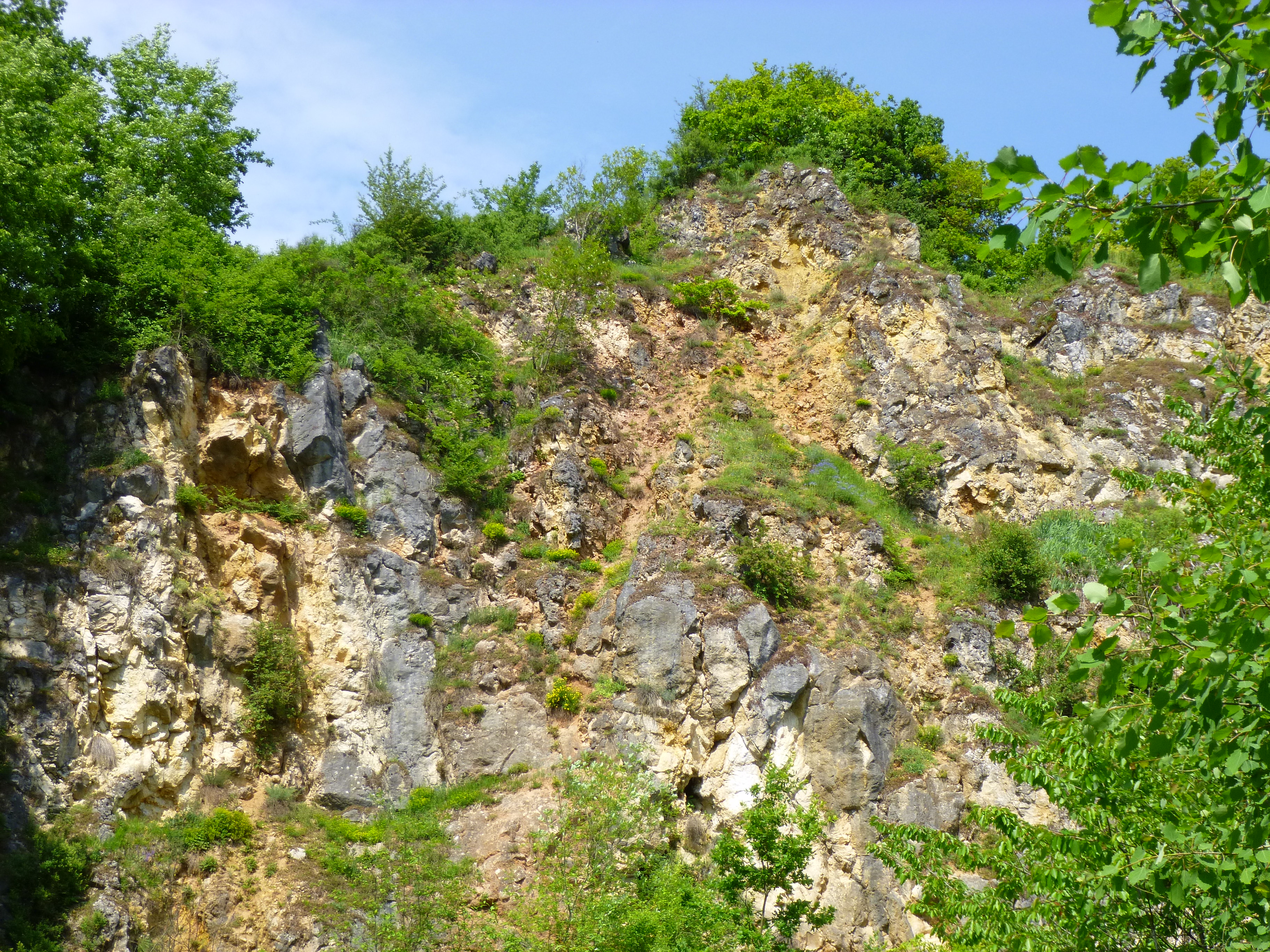 Ehemaliger Steinbruch am Südhang des Helmberges in der Gemeinde Steinach, Ortsteil Münster im Landkreis Straubing-Bogen. Der Steinbruch gehört zu den Geotopen im Landkreis Straubing-Bogen und trägt die Nummer 278A012.